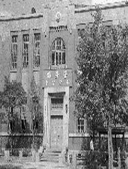 자유당 당사